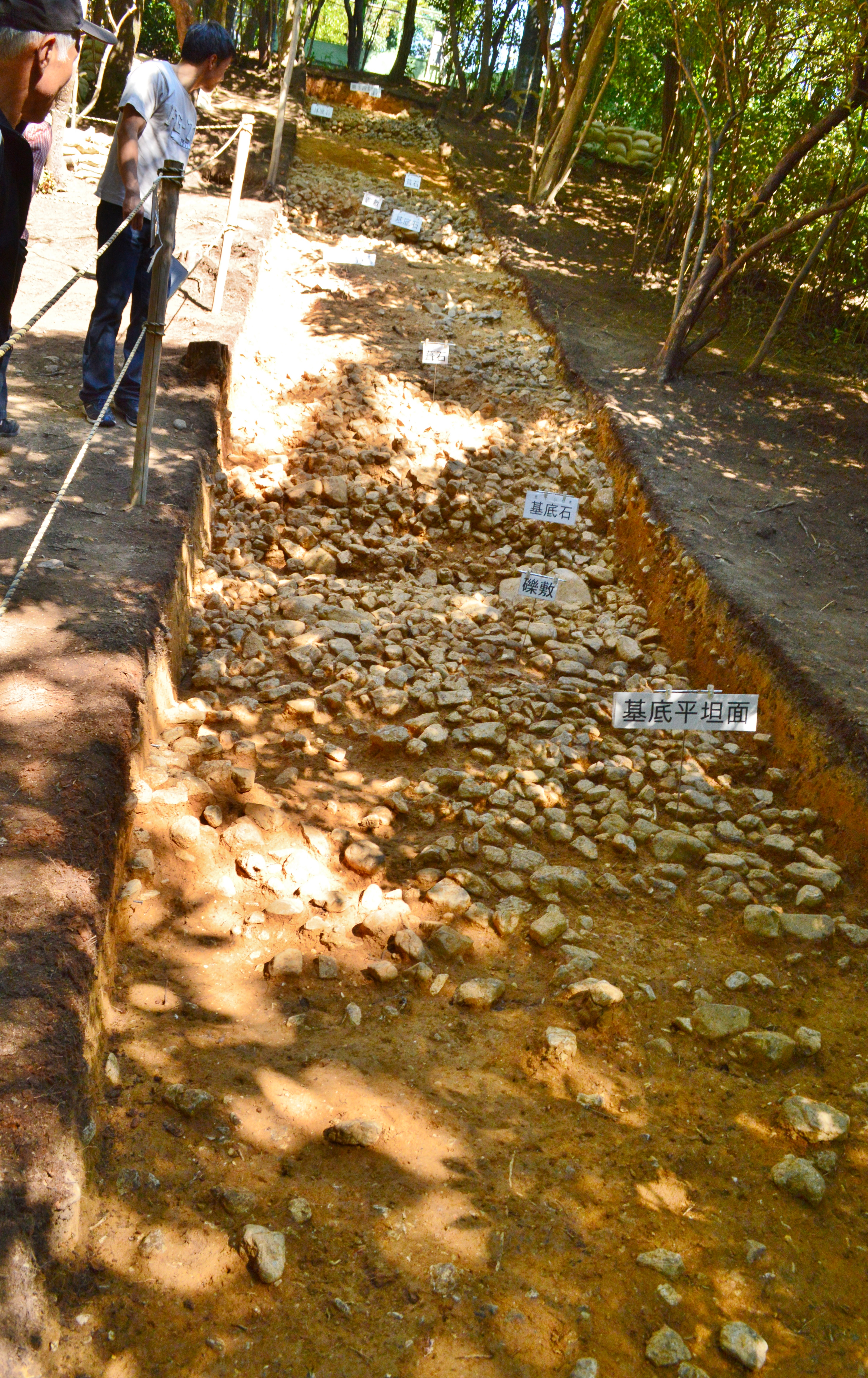 五塚原古墳 トレンチ (2016年発掘調査時)